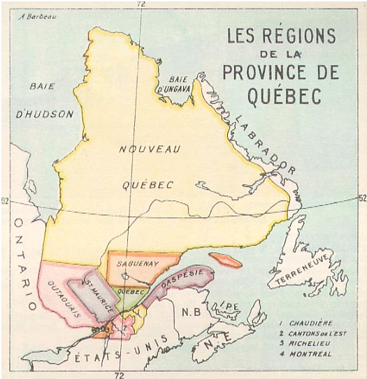 Carte des régions du Québec en 1923